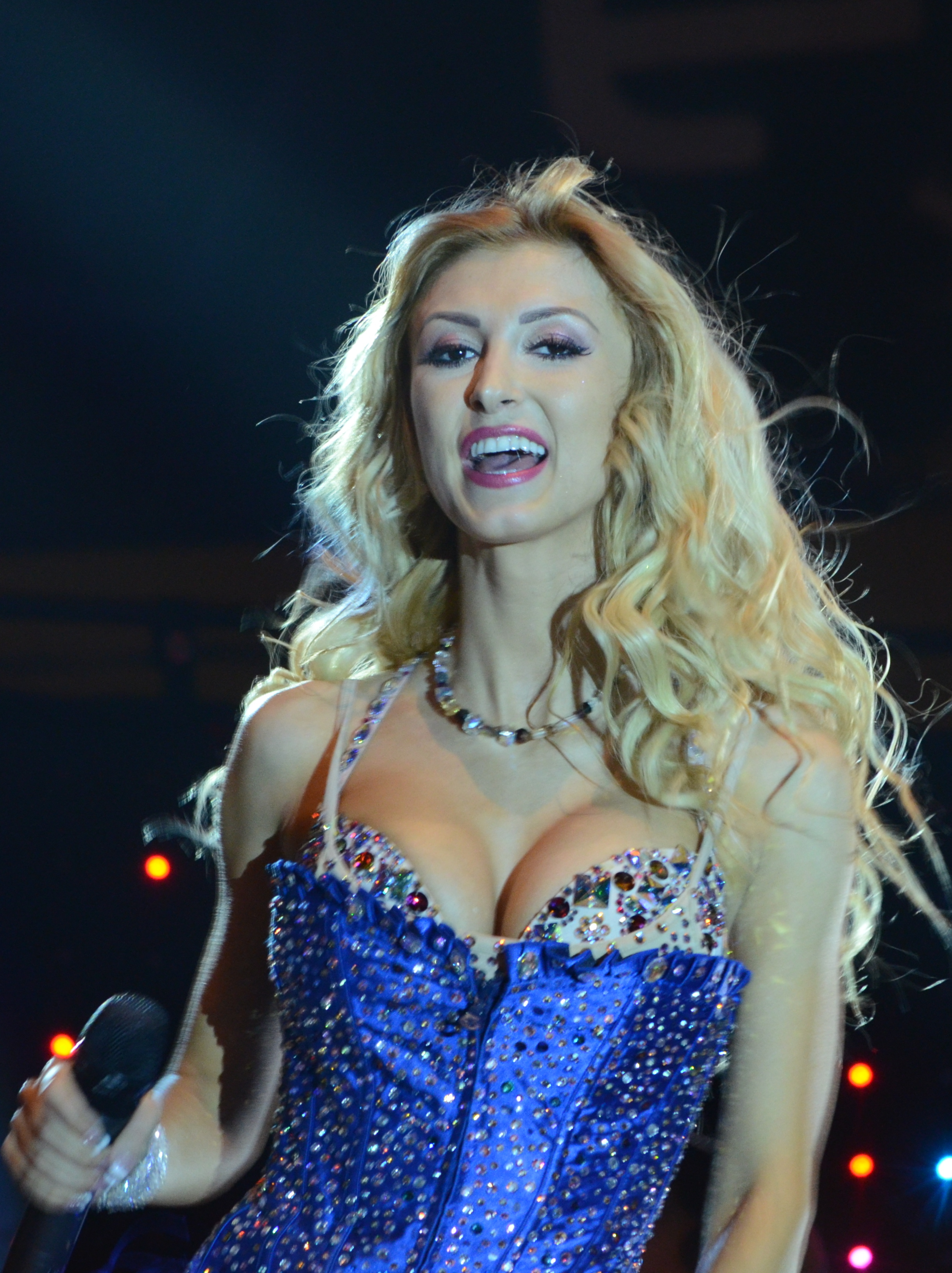 Andreea Bălan, la Mix Music Evolution 2012, București